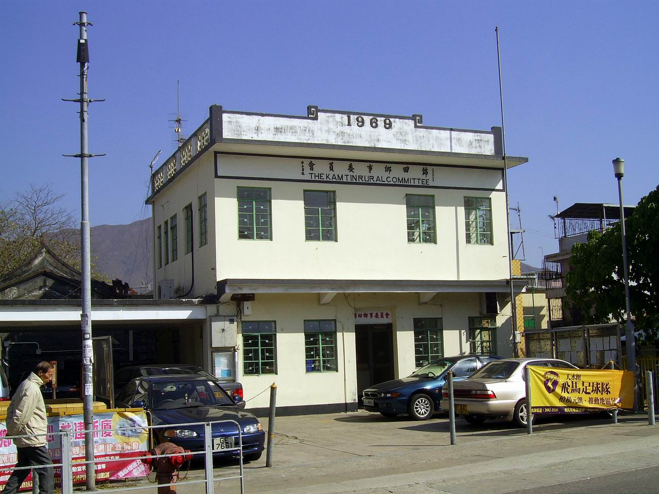 中文（香港）: 錦田鄉事委員會